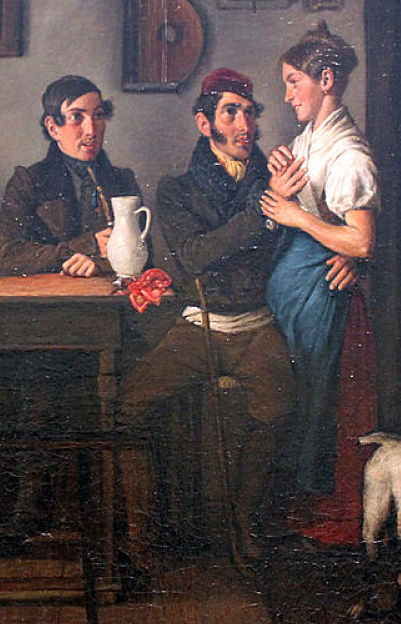 Détail recadré de File:1833 Neder Im Gasthof anagoria.JPG